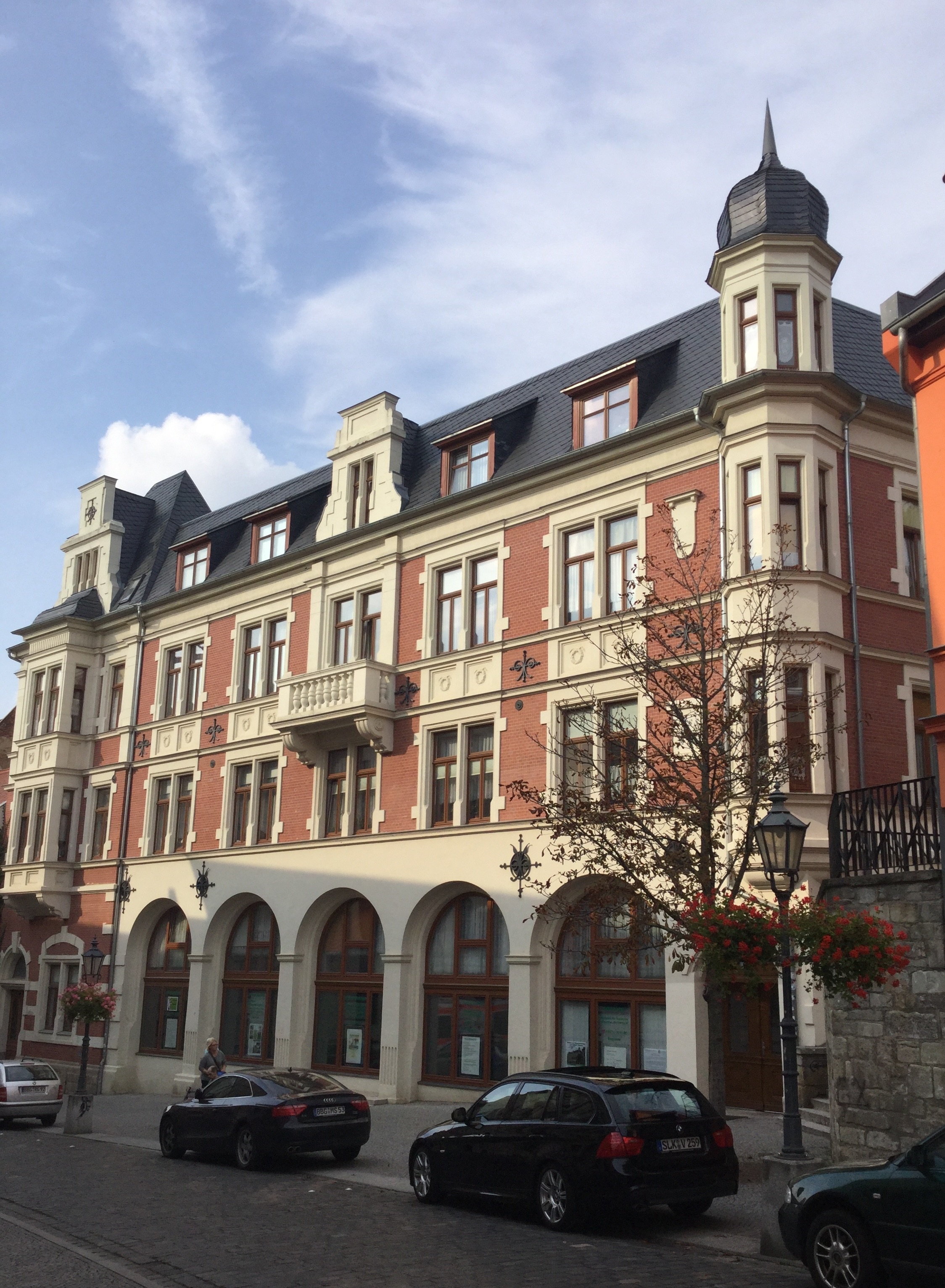 Haus Wilhelmstraße 1 in Bernburg